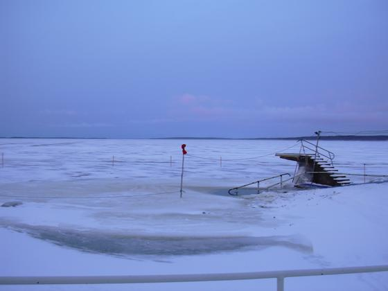 Díra v ledu (finsky avanto) na jezeře Näsi (Näsijärvi).